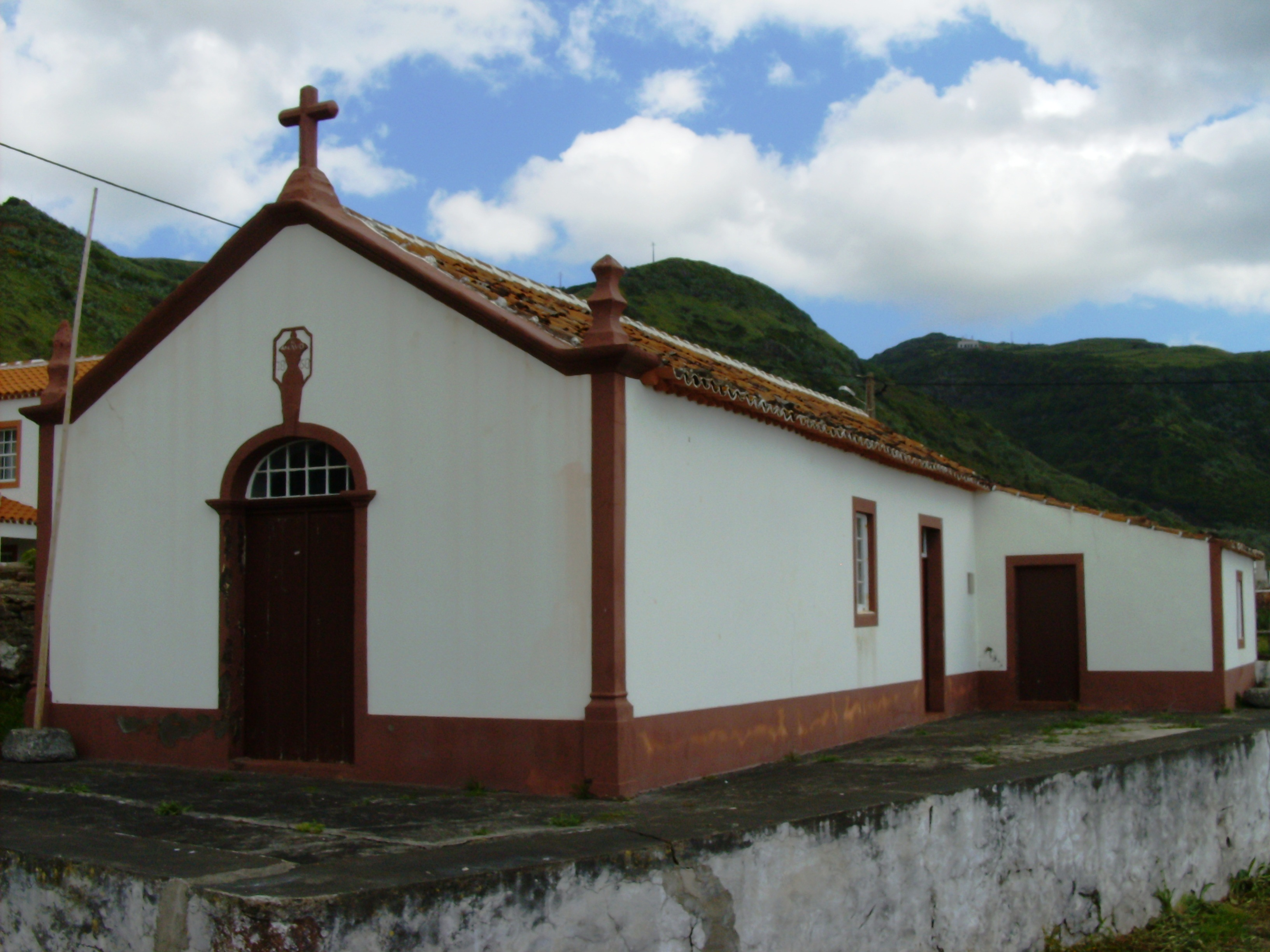 Ermida de Nossa Senhora dos Remédios (Ermida de Santo Amaro), Ilha de Santa Maria (Açores), Portugal.